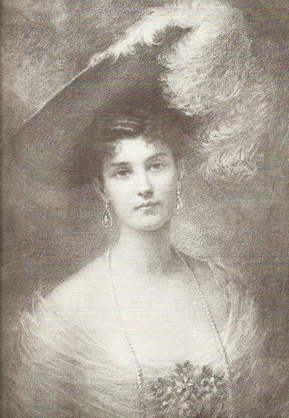 Joanna von Oppersdorff (1864–1947), druga żona księcia Hugona von Radolina